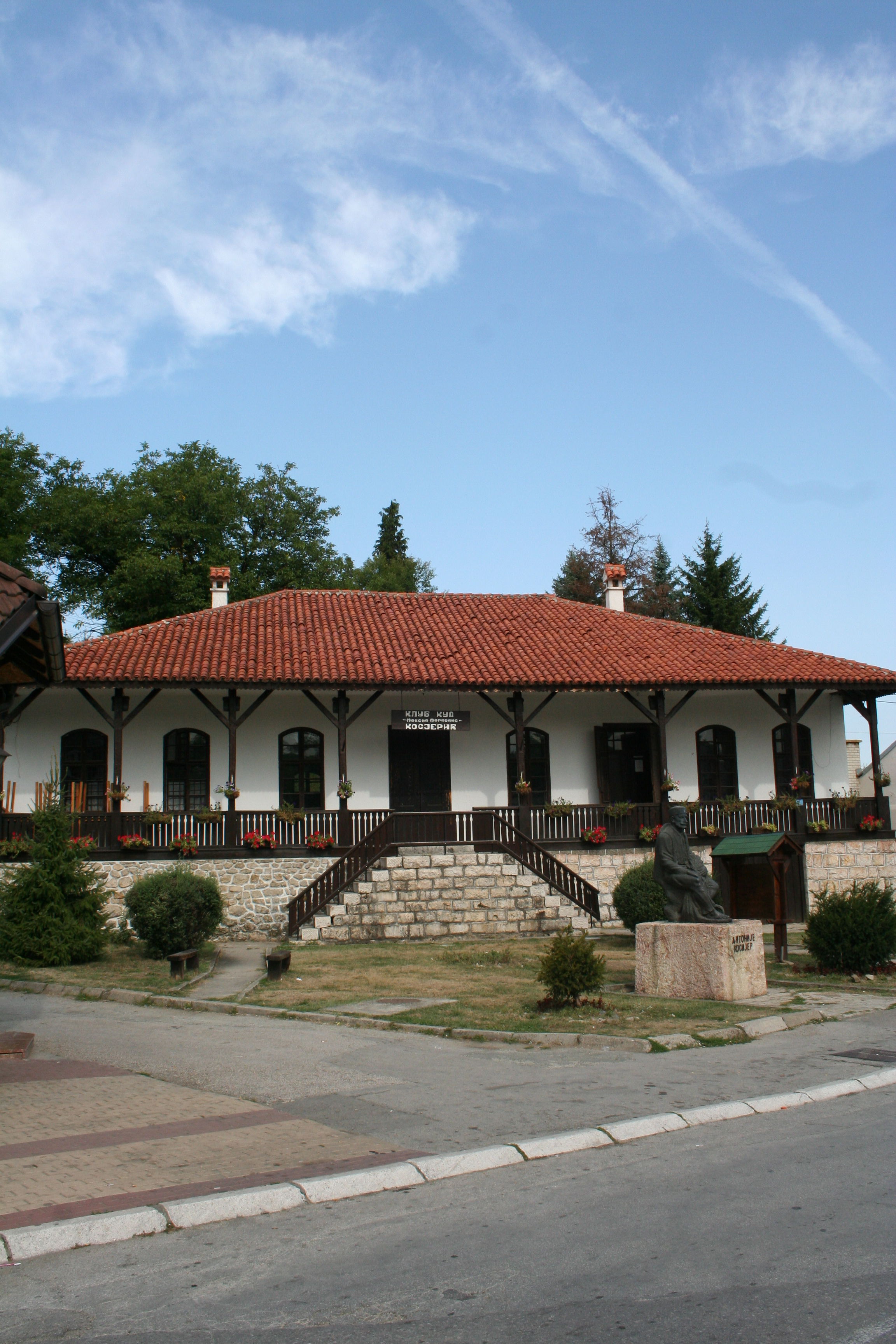 Stari han u Kosjeriću